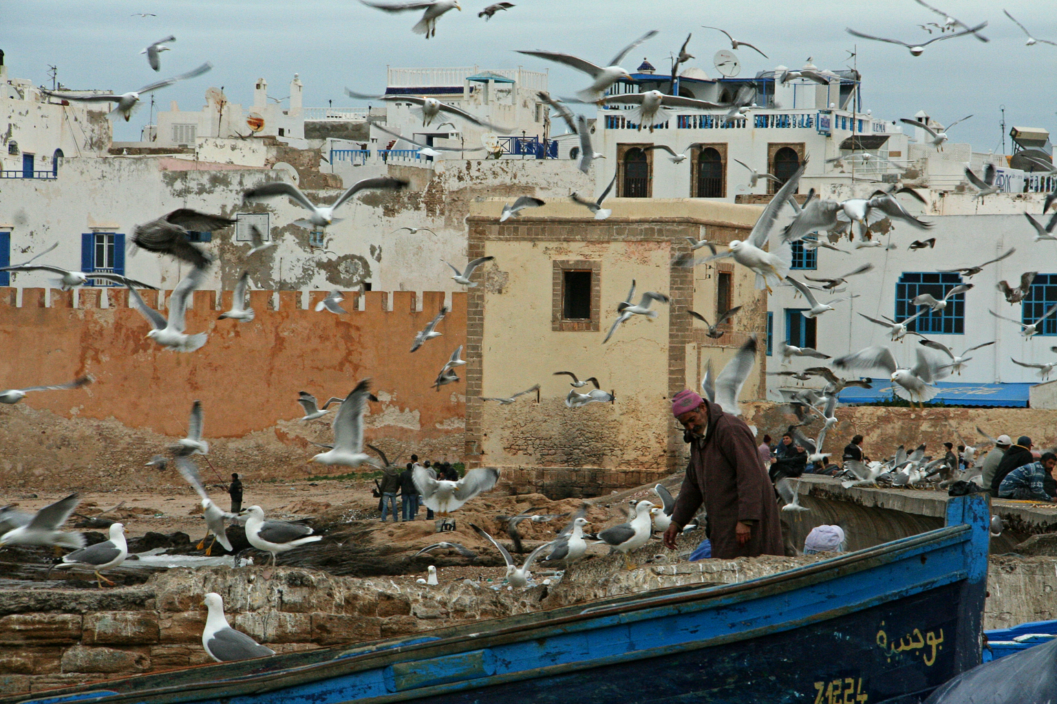 Seagulls, Essaouira